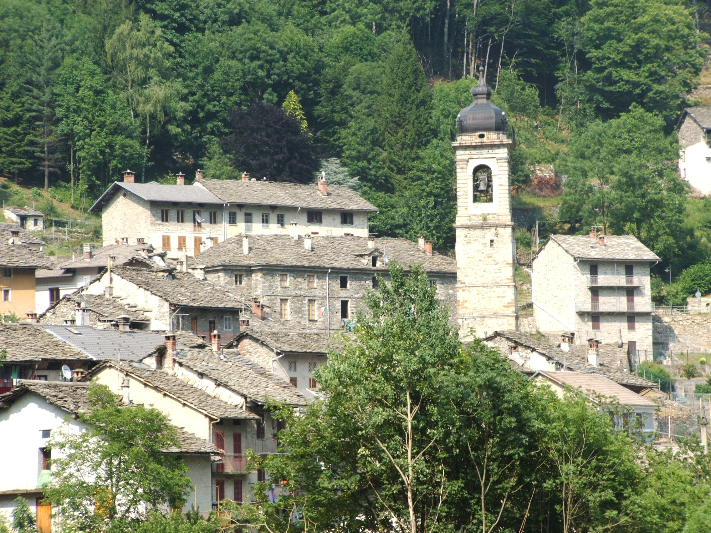 Piedicavallo, comune della Valle Cervo, provincia di Biella (Piemonte, Italia)